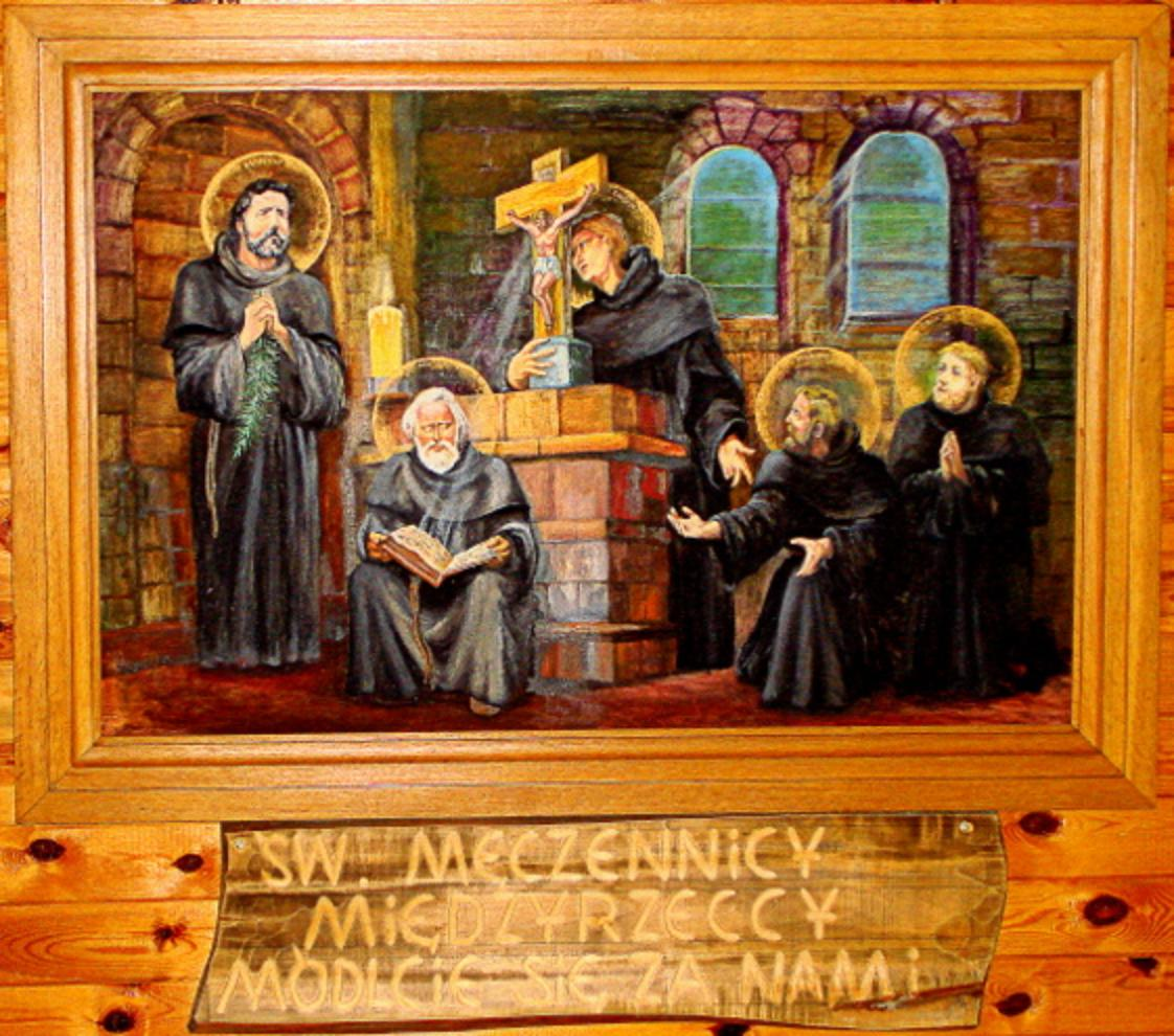 Rokitno, Pustelnia Świętych Braci Męczenników Międzyrzeckich, obraz świętych: Benedykta, Jana, Mateusza, Izaaka, Krystyna